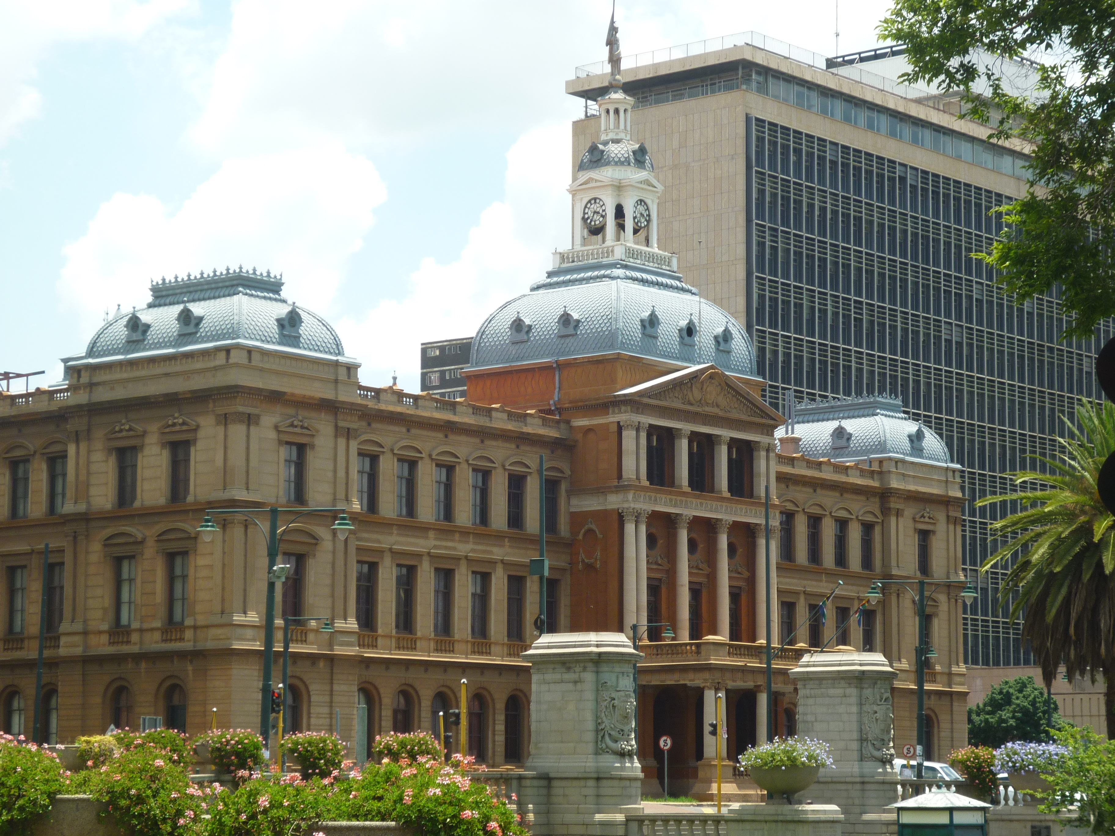 Ou Raadsaal, Pretoria, Südafrika